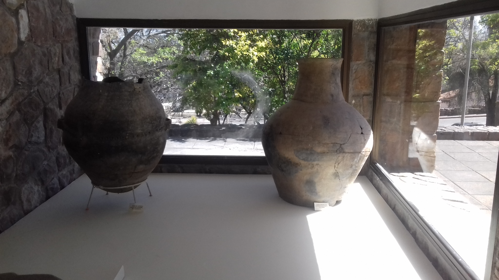 El museo depende de la Dirección General de Patrimonio Cultural perteneciente a la Secretaría de Cultura de la Provincia, y fue inaugurado el 21 de abril de 1975, como Museo Arqueológico de Salta. En la imagen se observa 2 Vasijas grandes: piezas arqueológicas provenientes de distintos sitios de la provincia.objeto